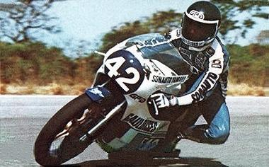 Patrick Pons sur Yamaha 350cm3 (1979), 'Moto Sport 79', Panini figurina n°117.